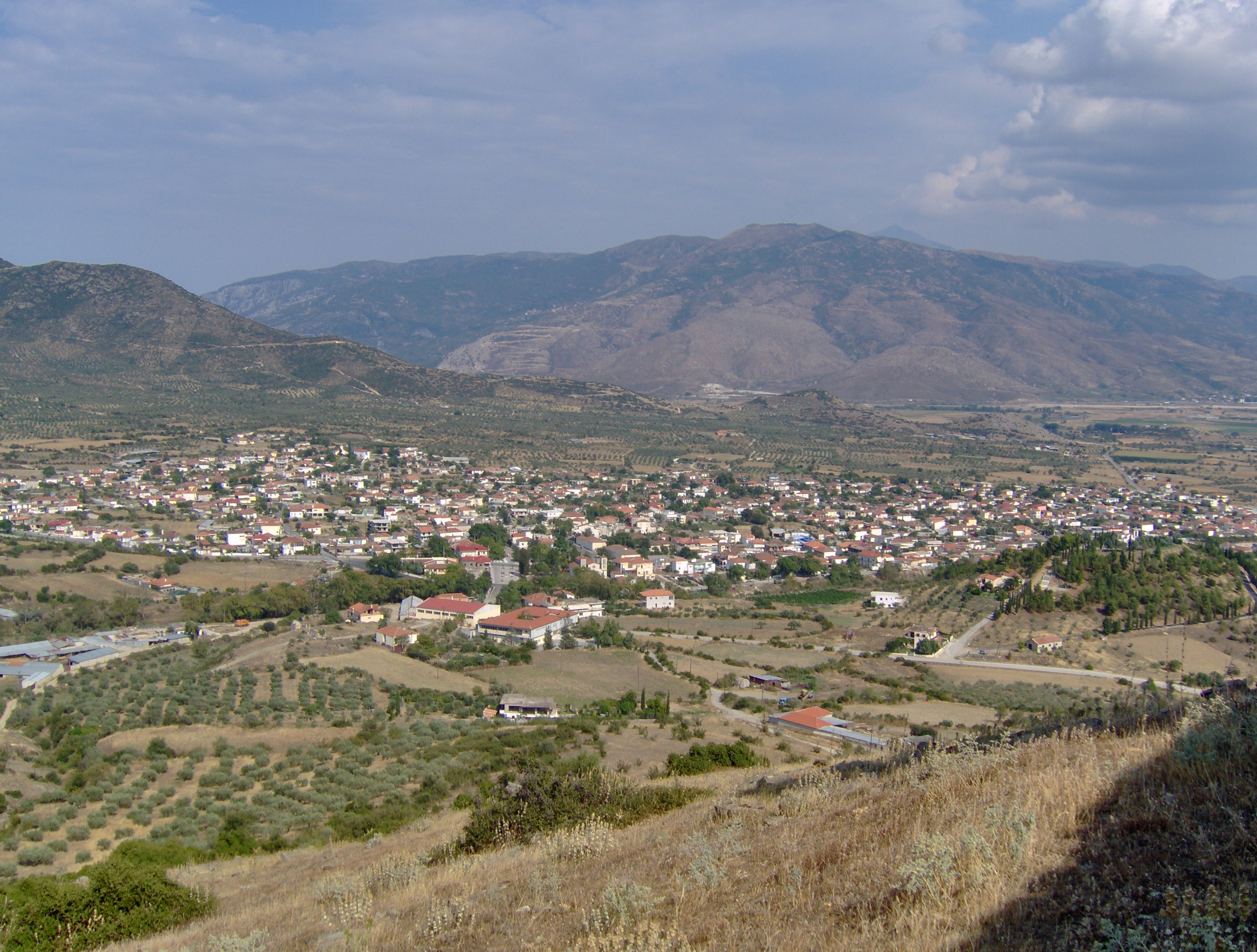 Γόννοι